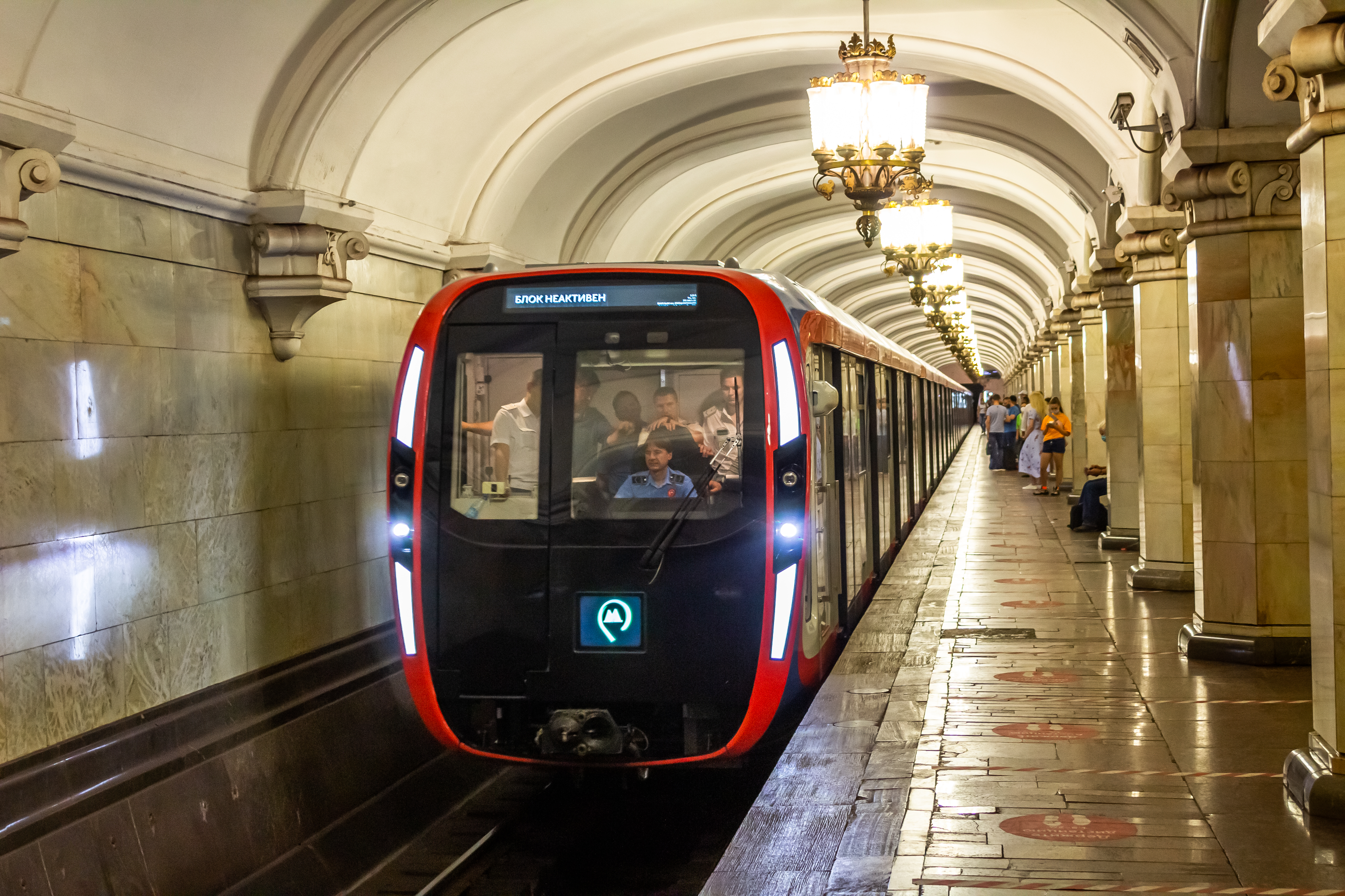 Метропоезд Москва 2020 на обкатке кольцевой линии